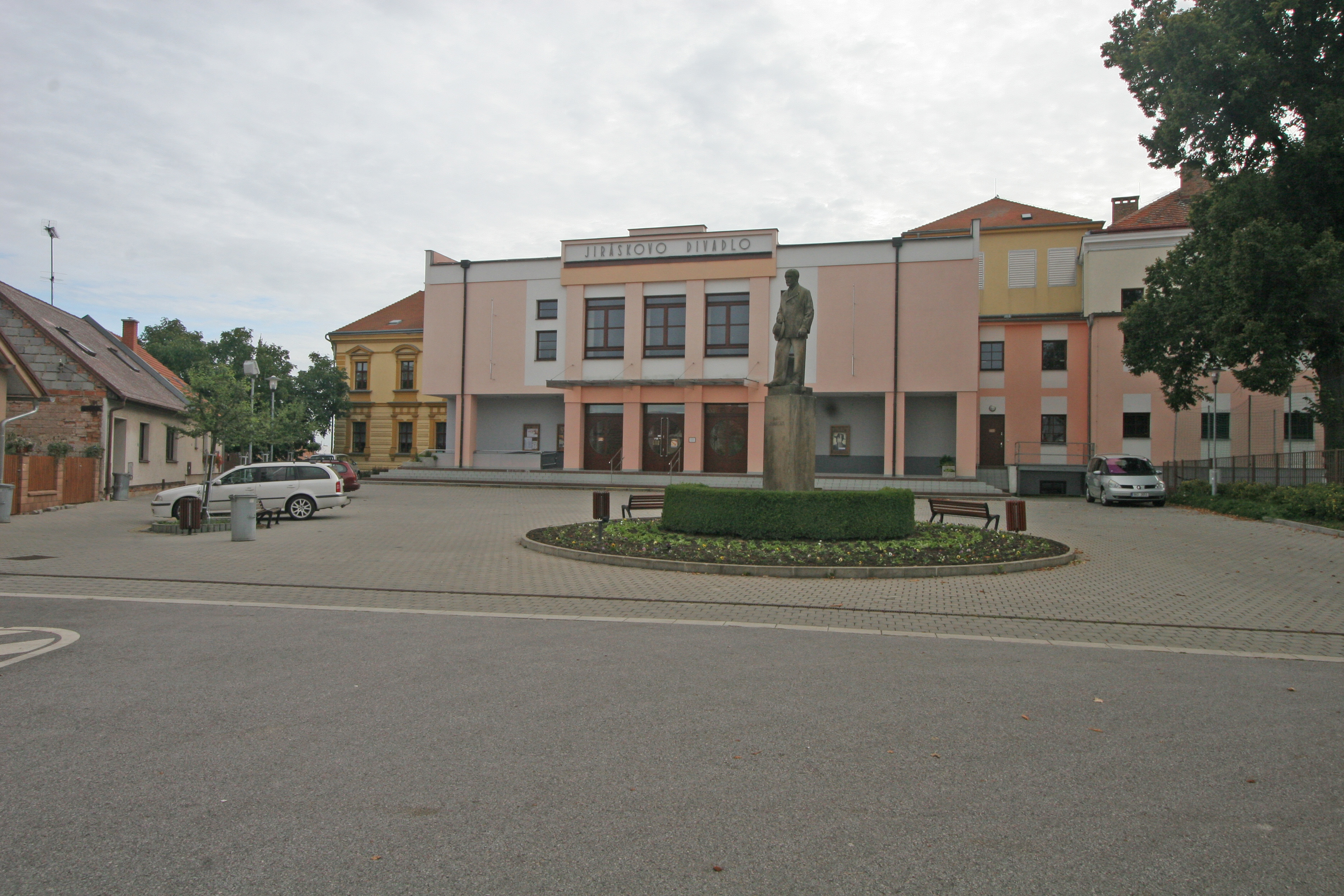 Divadlo Jiráskovo (Nový Bydžov), Jiráskova 562, Nový Bydžov